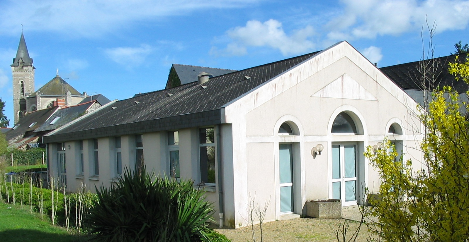 salle des fêtes de Brain-sur-Longuenée (49)